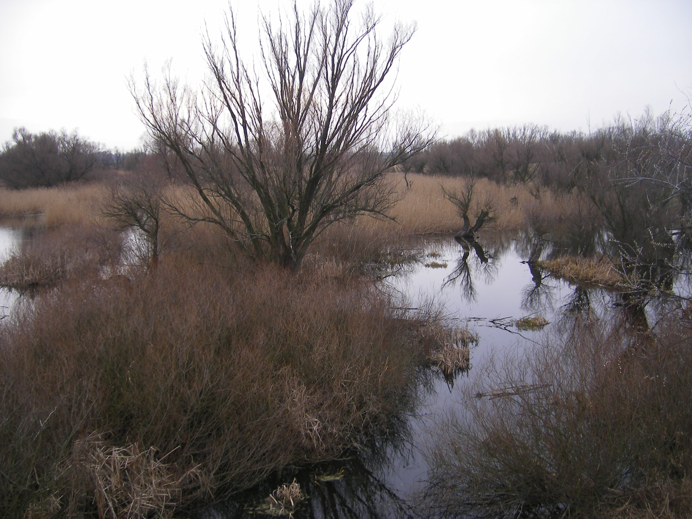 Martos, a Zsitva ártere védett terület